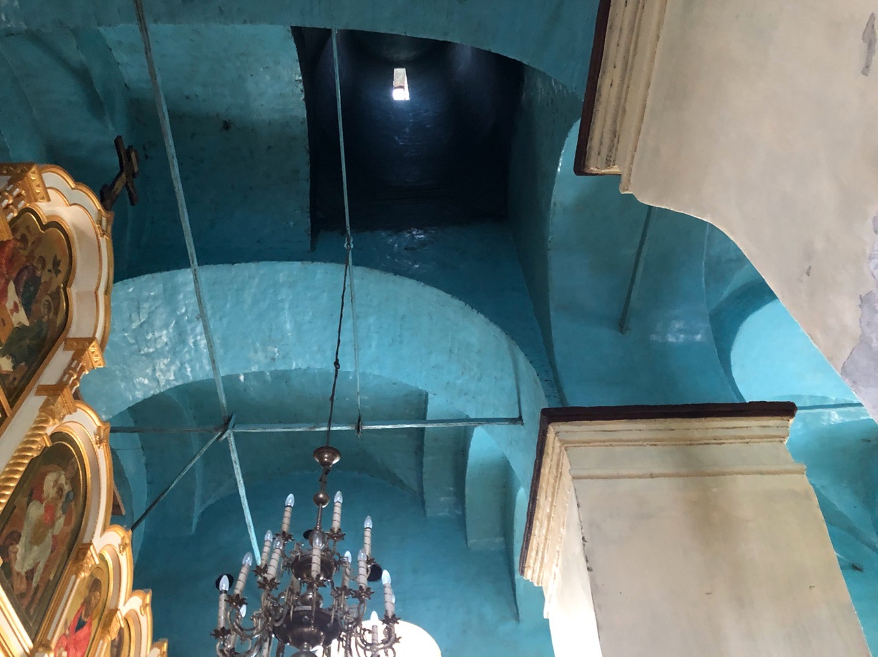 Свод церкви Рождества Христова на Городище